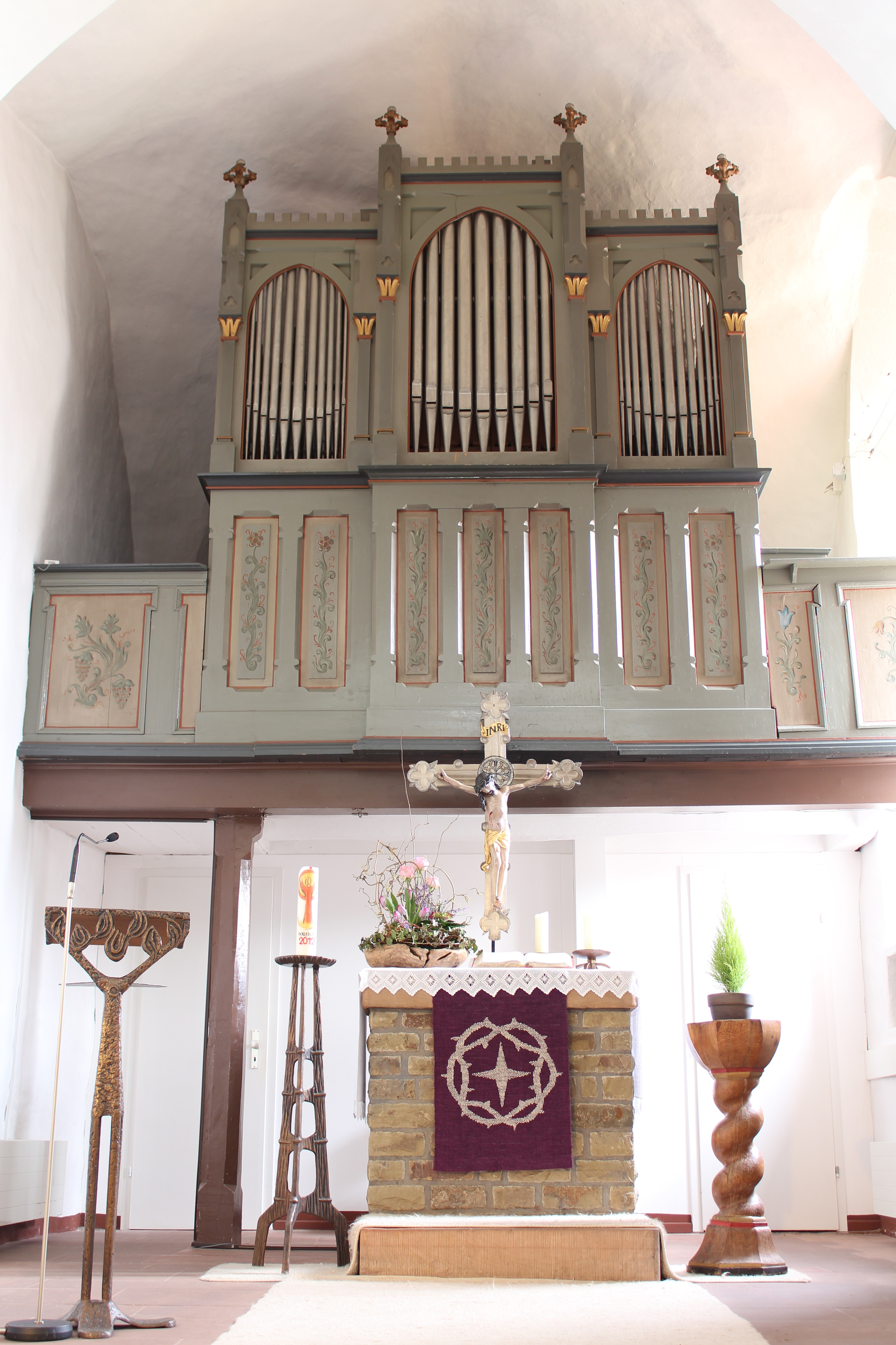 Raßmann-Orgel der evangelischen Martinskirche zu Dautphetal-Buchenau